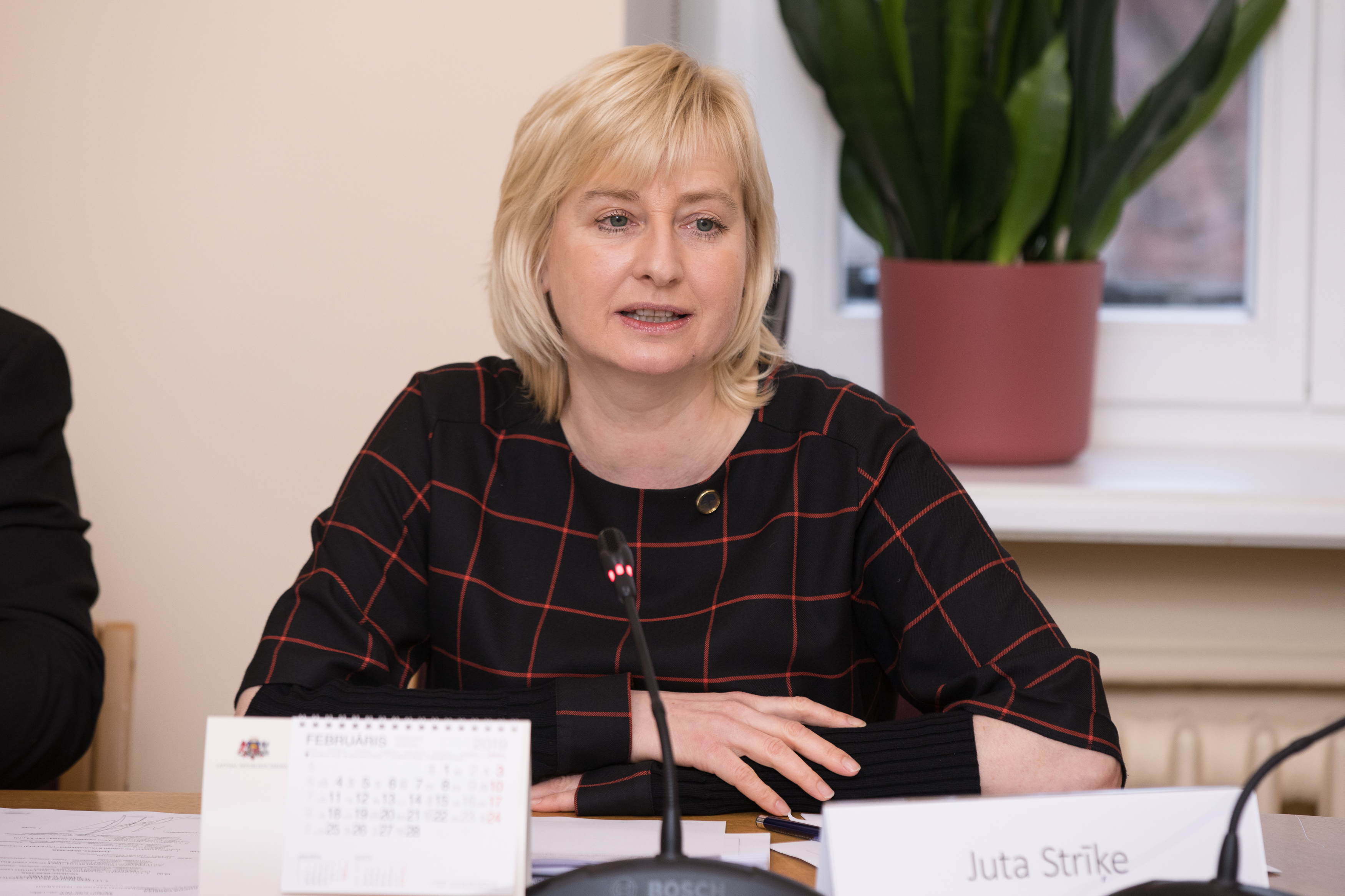 2019.gada 6.februāris. Juridiskās komisijas sēde. Foto: Ernests Dinka, Saeima Izmantošanas noteikumi: saeima.lv/lv/autortiesibas